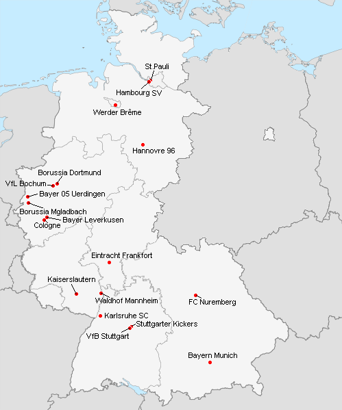 Répartition des clubs en 1.Bundesliga 1988-1989.